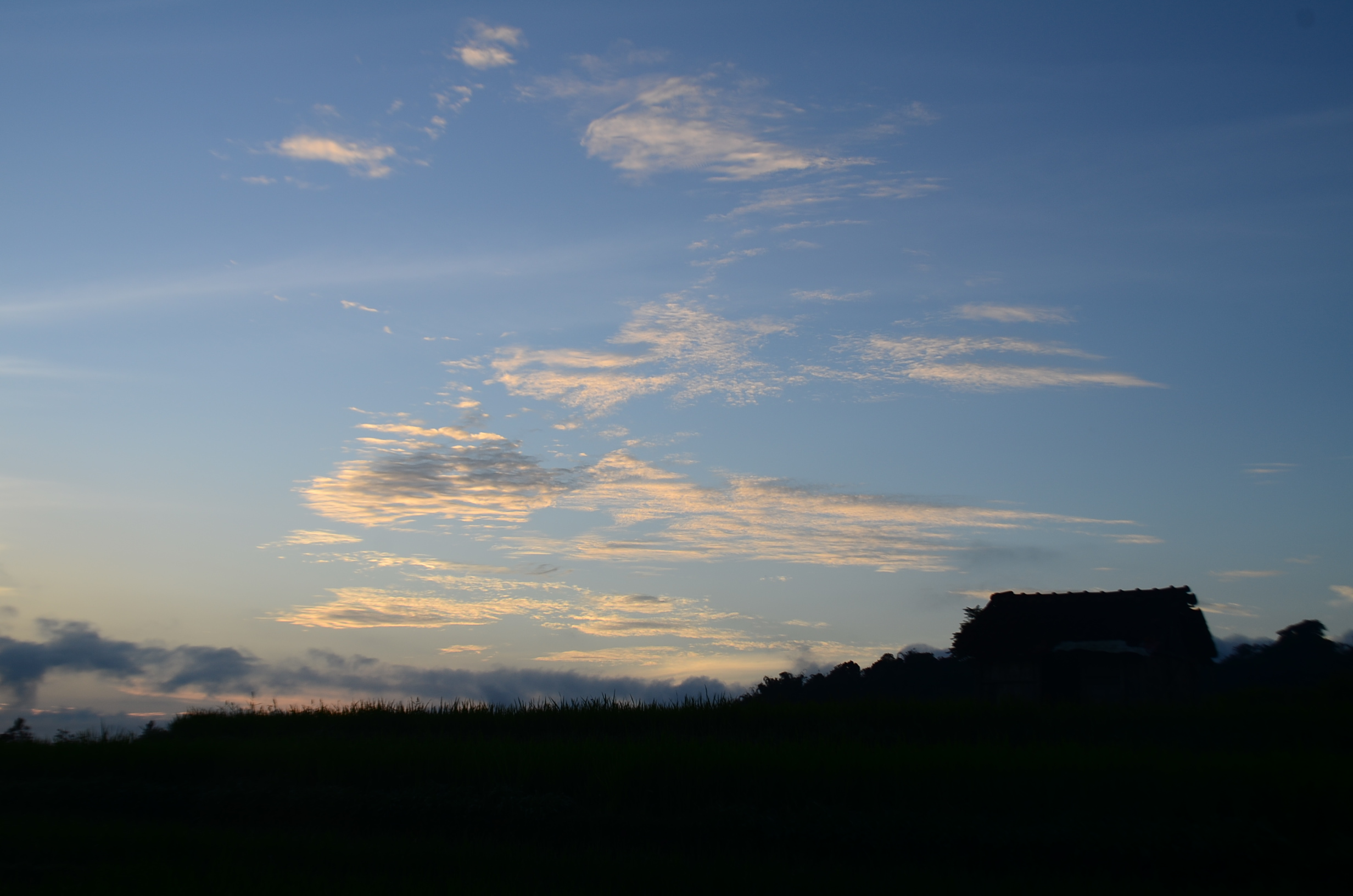 Penampakan menjelang terbitnya matahari (sunrise) dari sisi utara Gn. Lawu